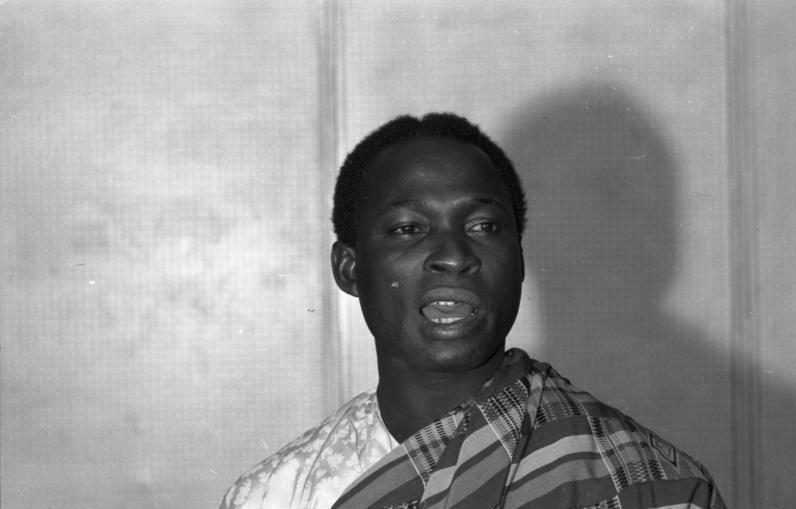 Essen für Informationsminister Kofi Baako aus Ghana im Presseclub